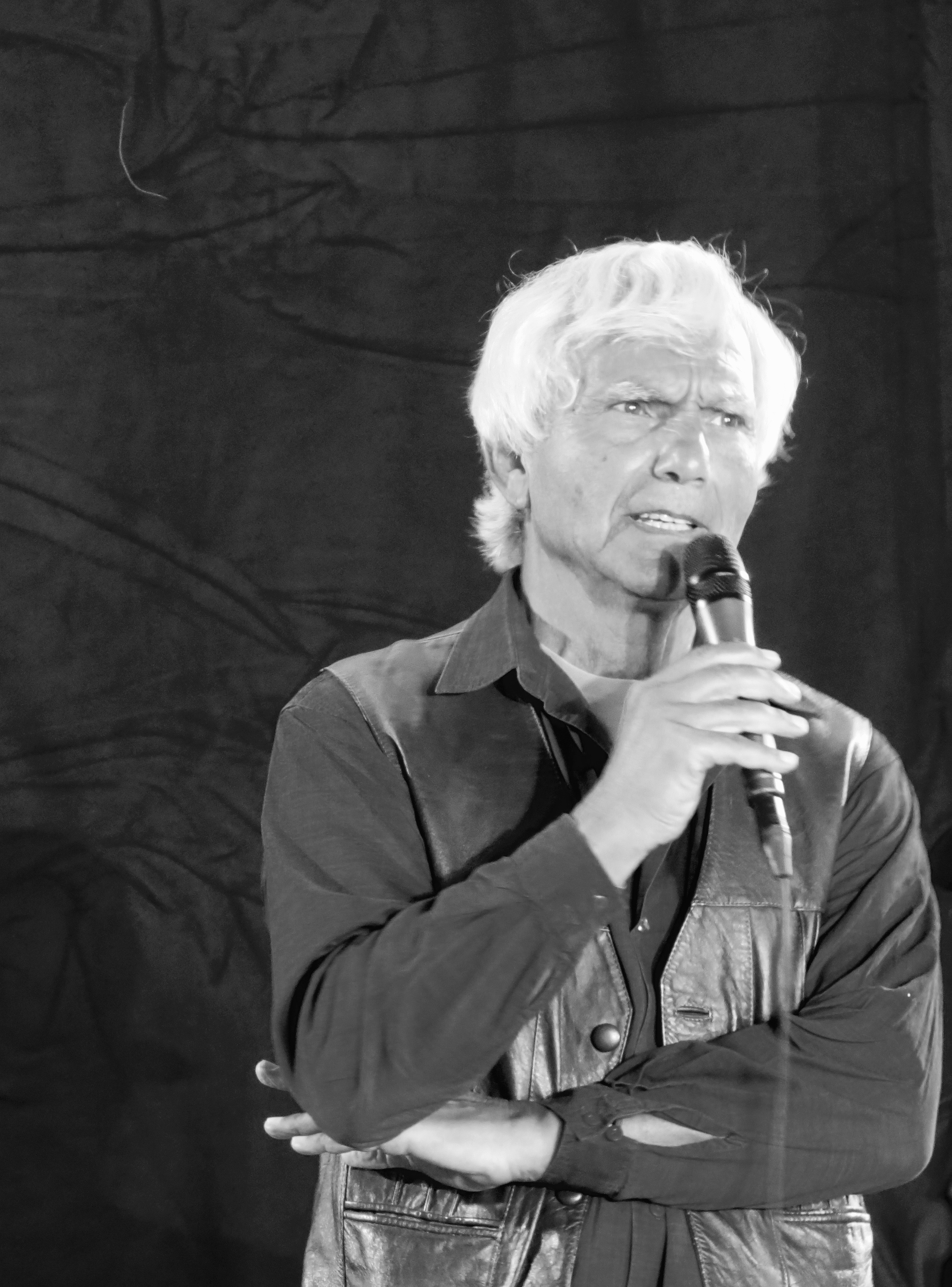 Eugenio Barba, teaterinstruktør